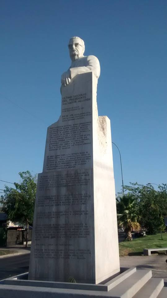 Estatua del ex presidente chileno, Salvador Allende